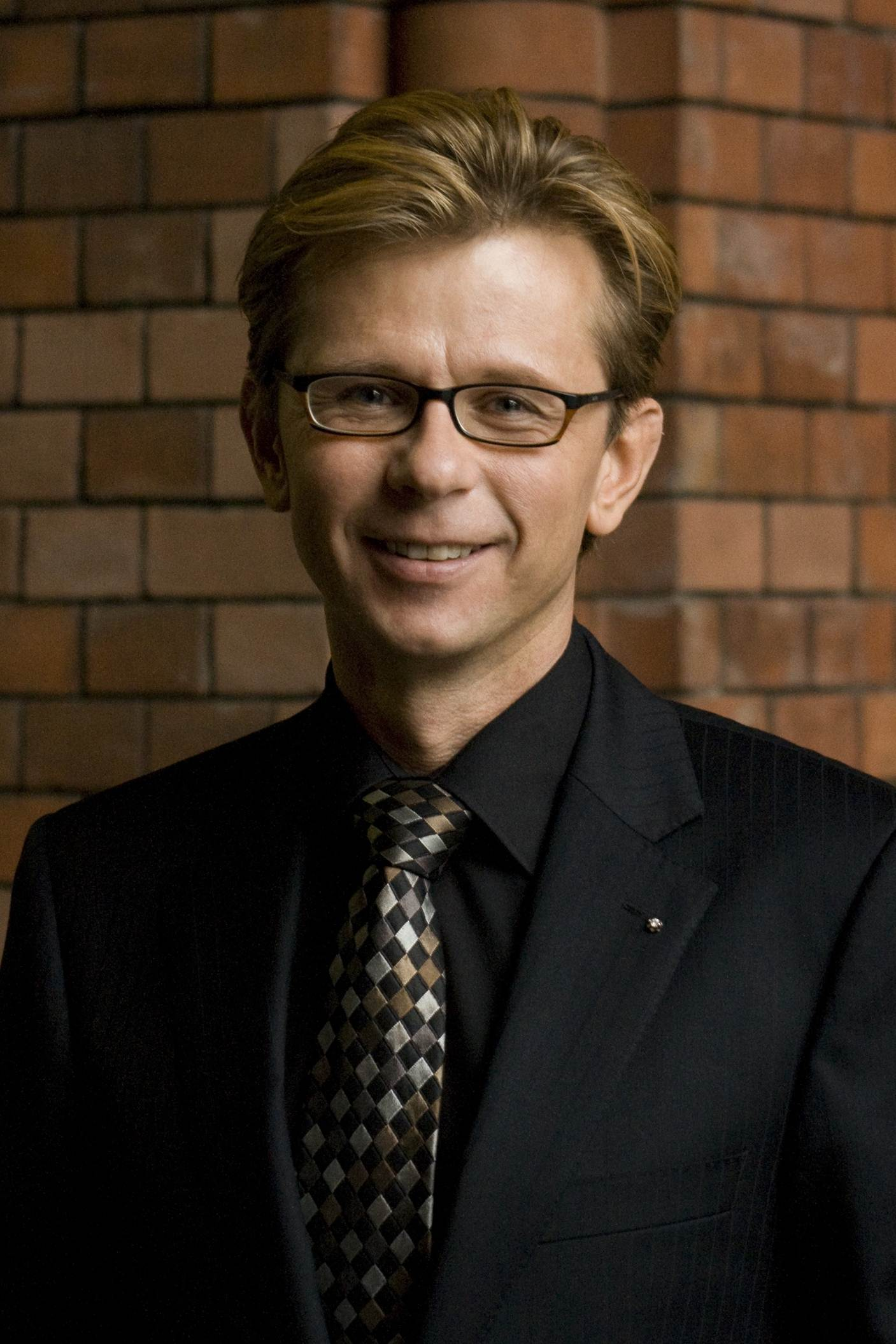 free of copyright